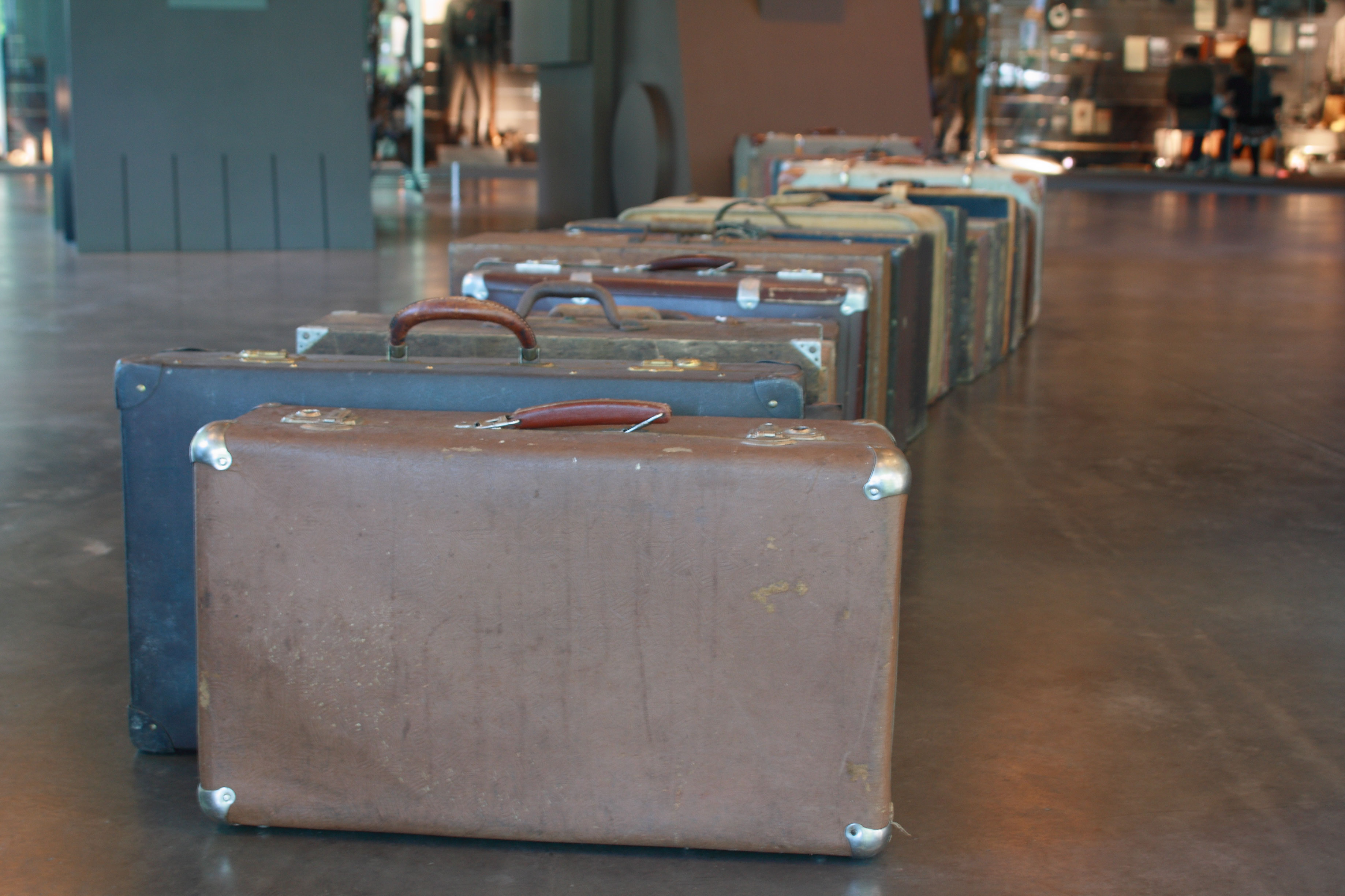 Valik Eestist lahkuma sunnitud inimeste kohvreid